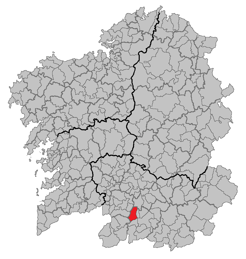 Mapa coa localización do concello de Rairiz de Veiga.